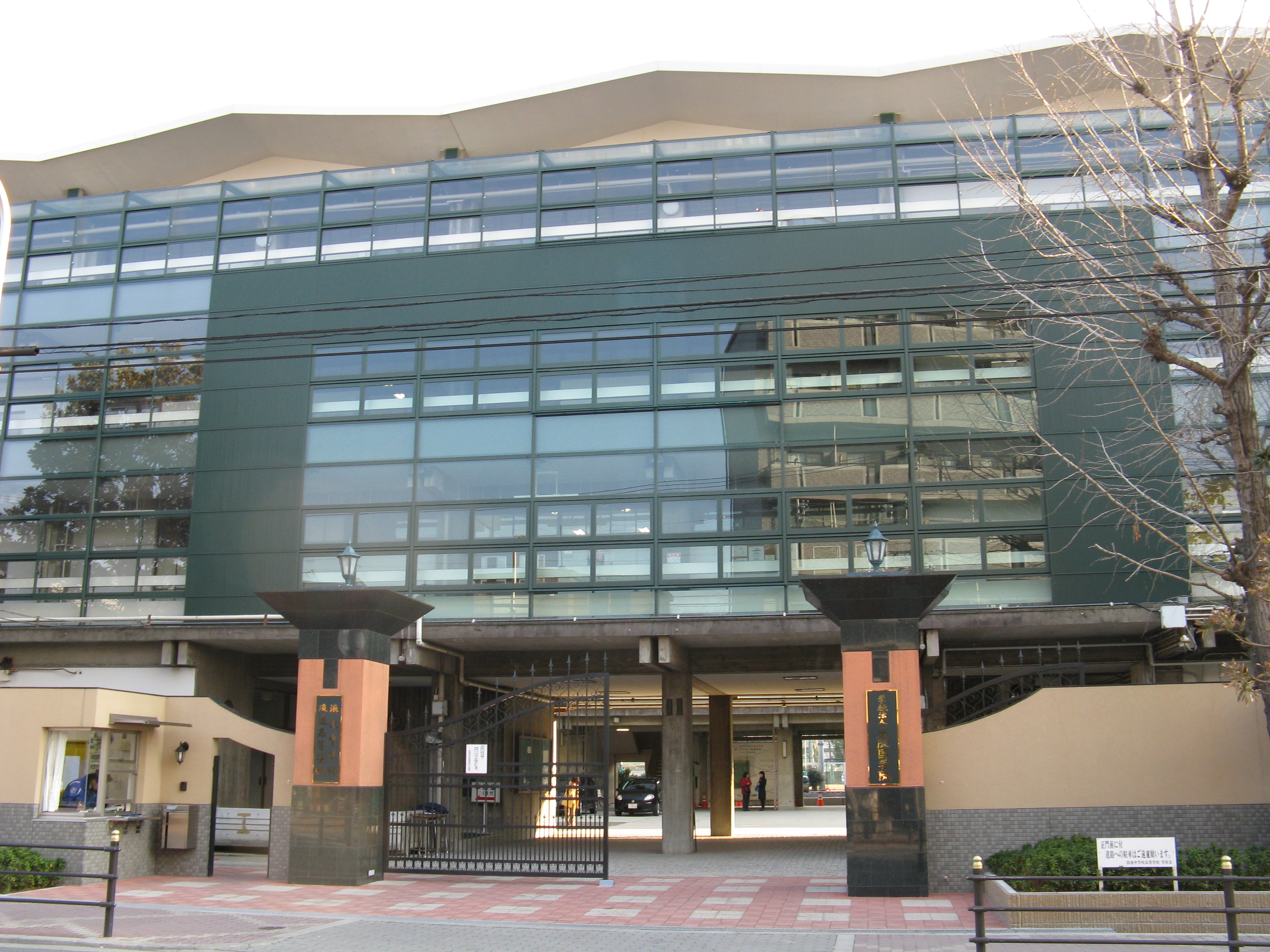 浪速中学校・高等学校